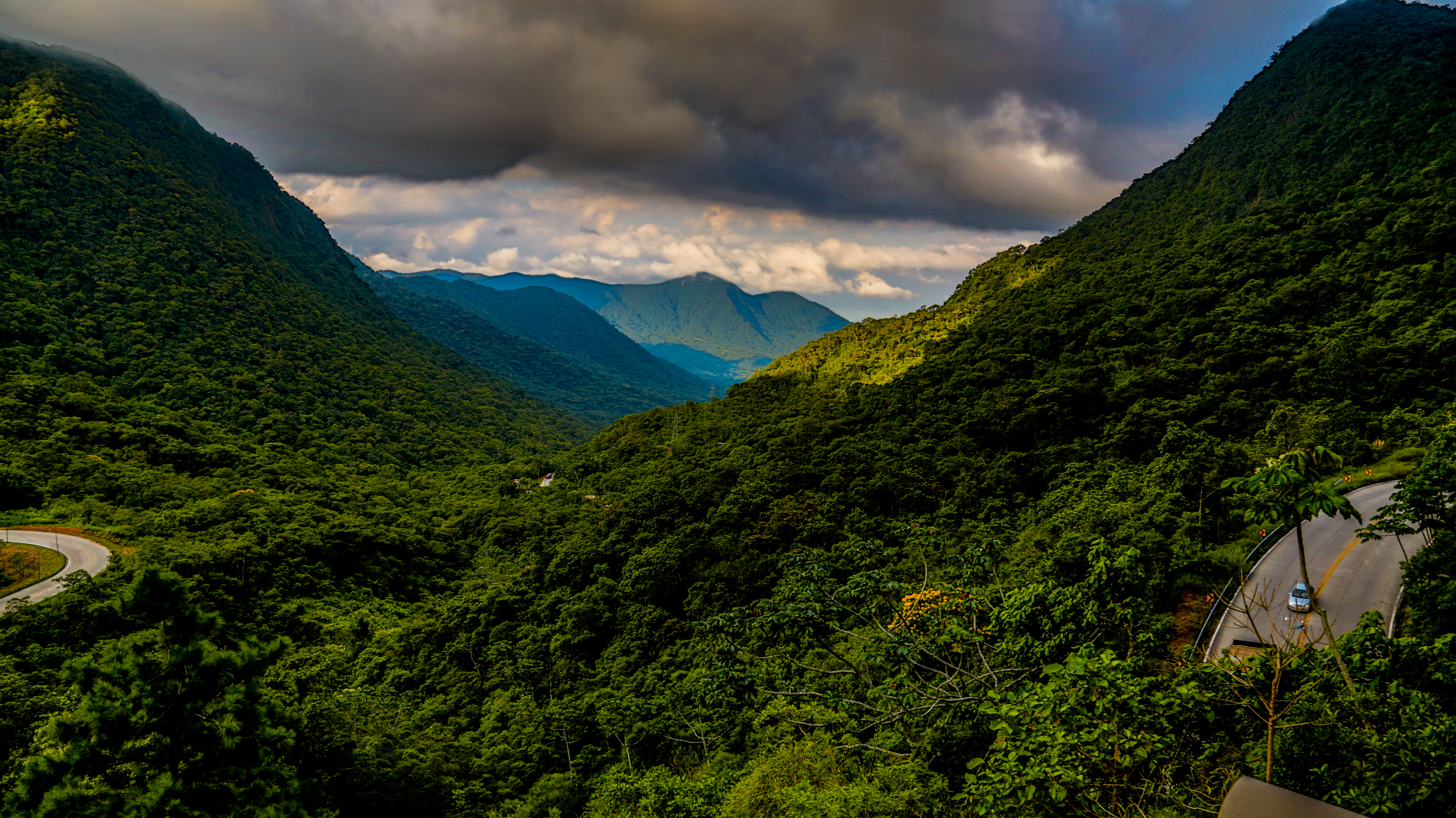 Vista da Serra Dona Francisca - Joinville -Campo Alegre - Santa Catarina - Brasil